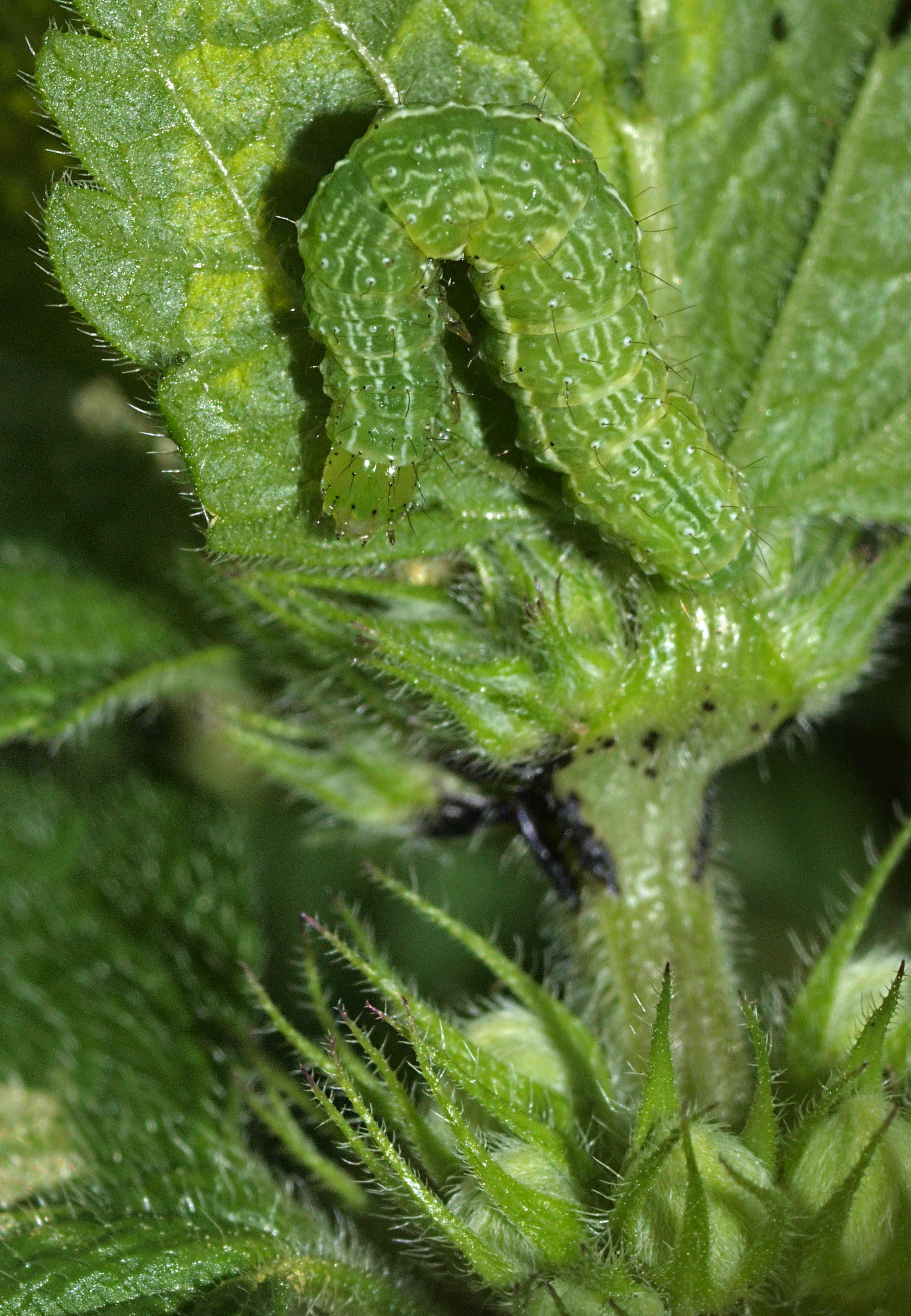 On White Dead Nettle (Lamium album). Messingugle larve på døvnælde.